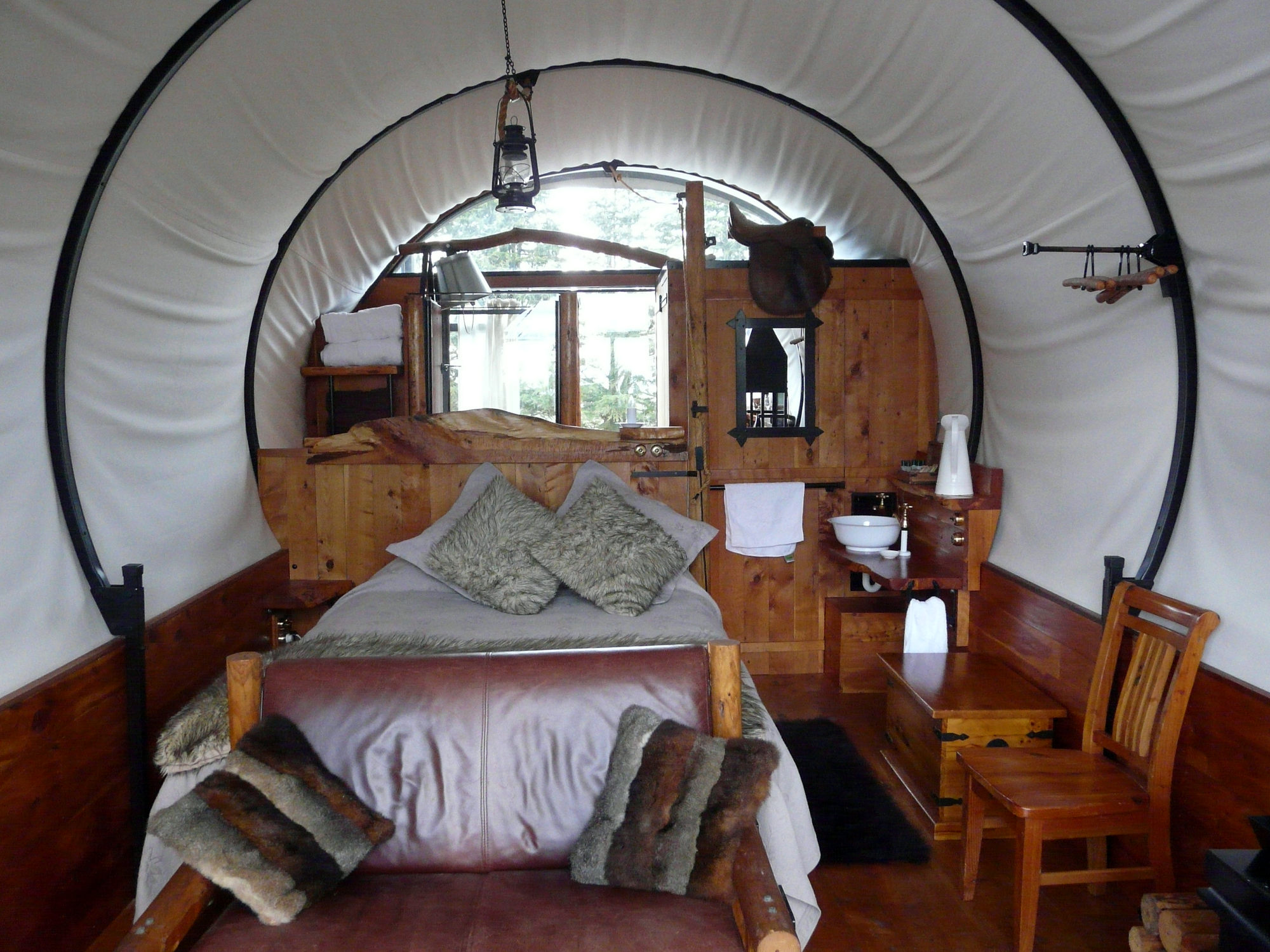 Type de logement glamping à Kirwee, Nouvelle-Zélande, vue intérieur